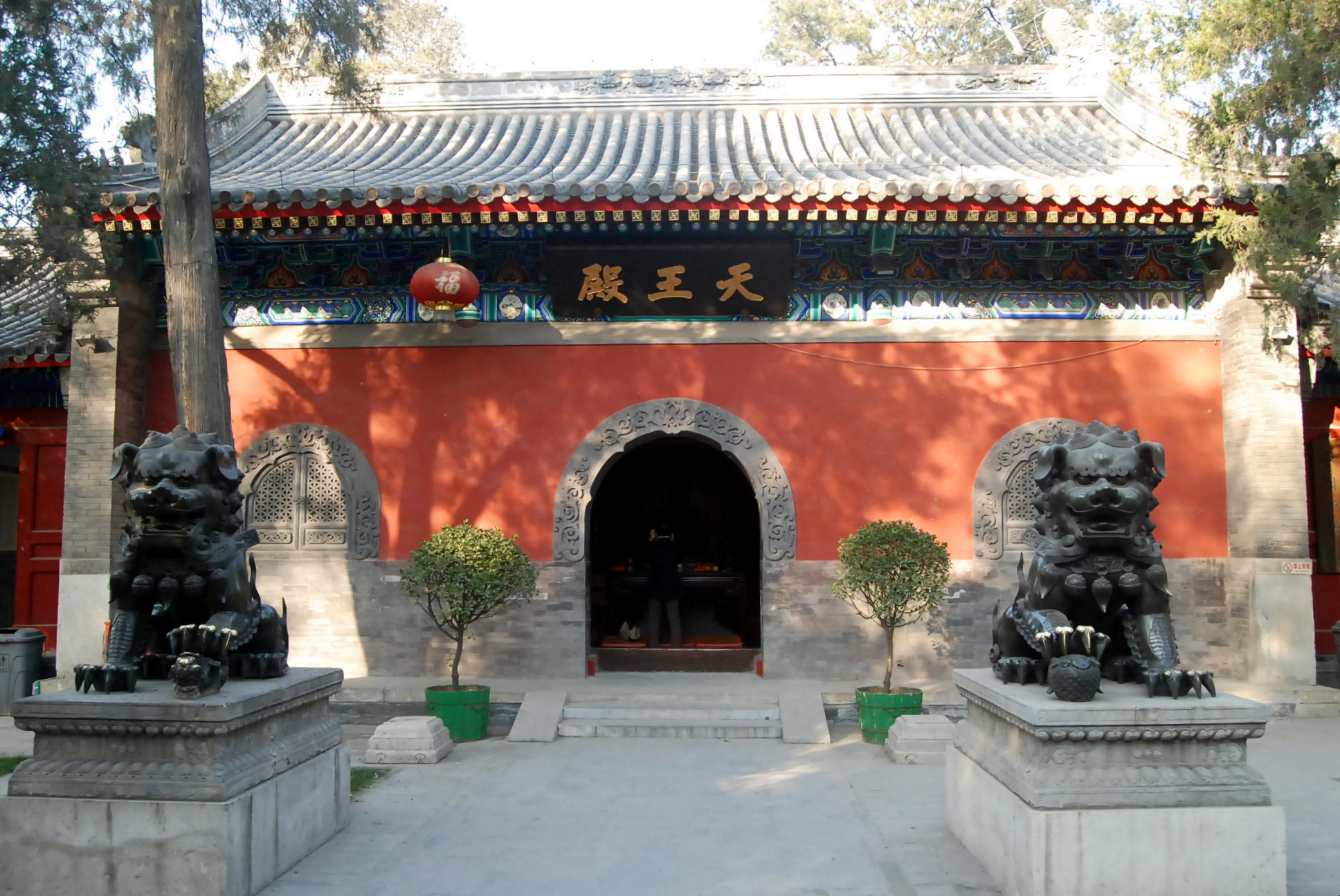 法源寺天王殿